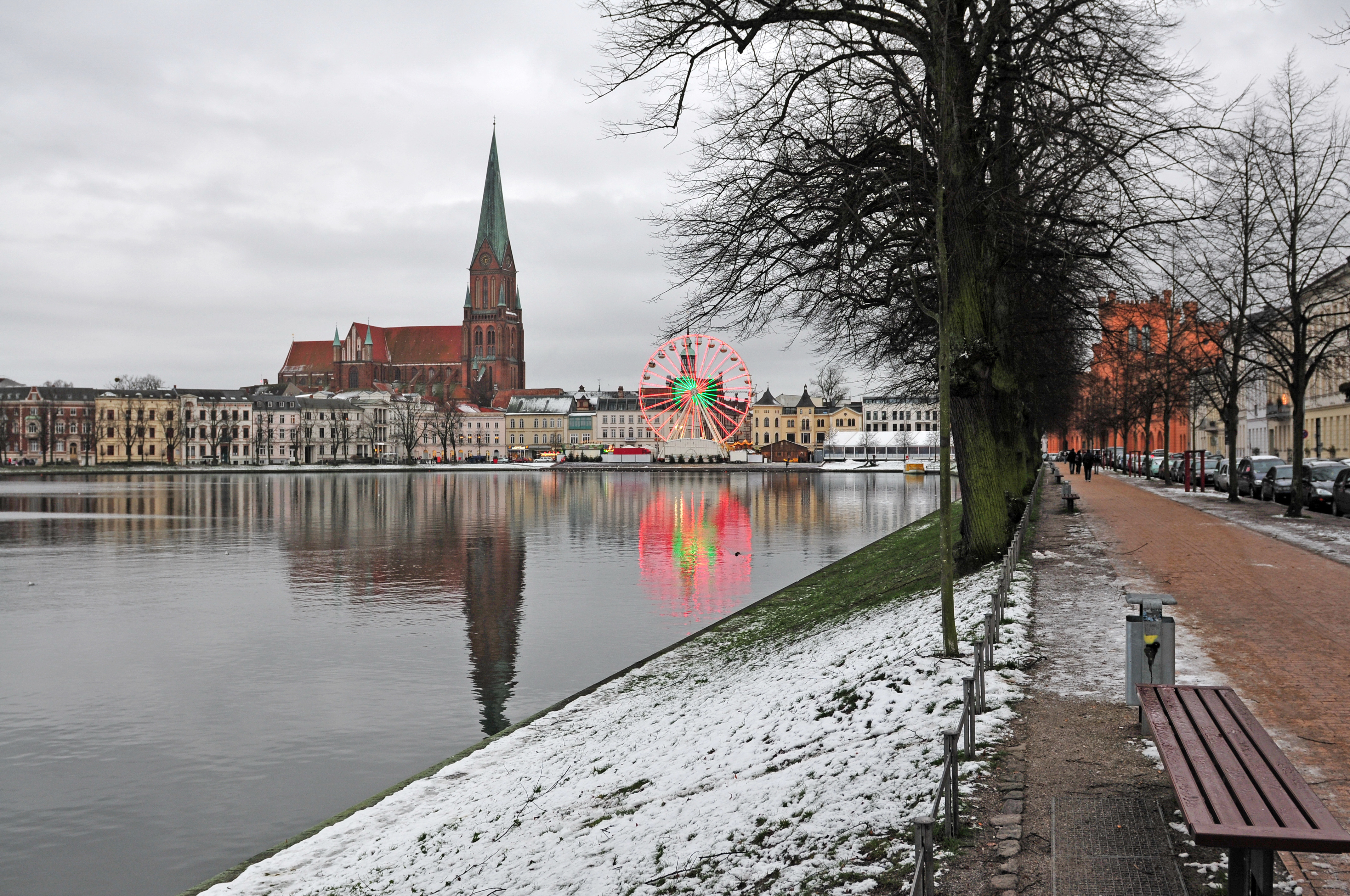 Schwerin